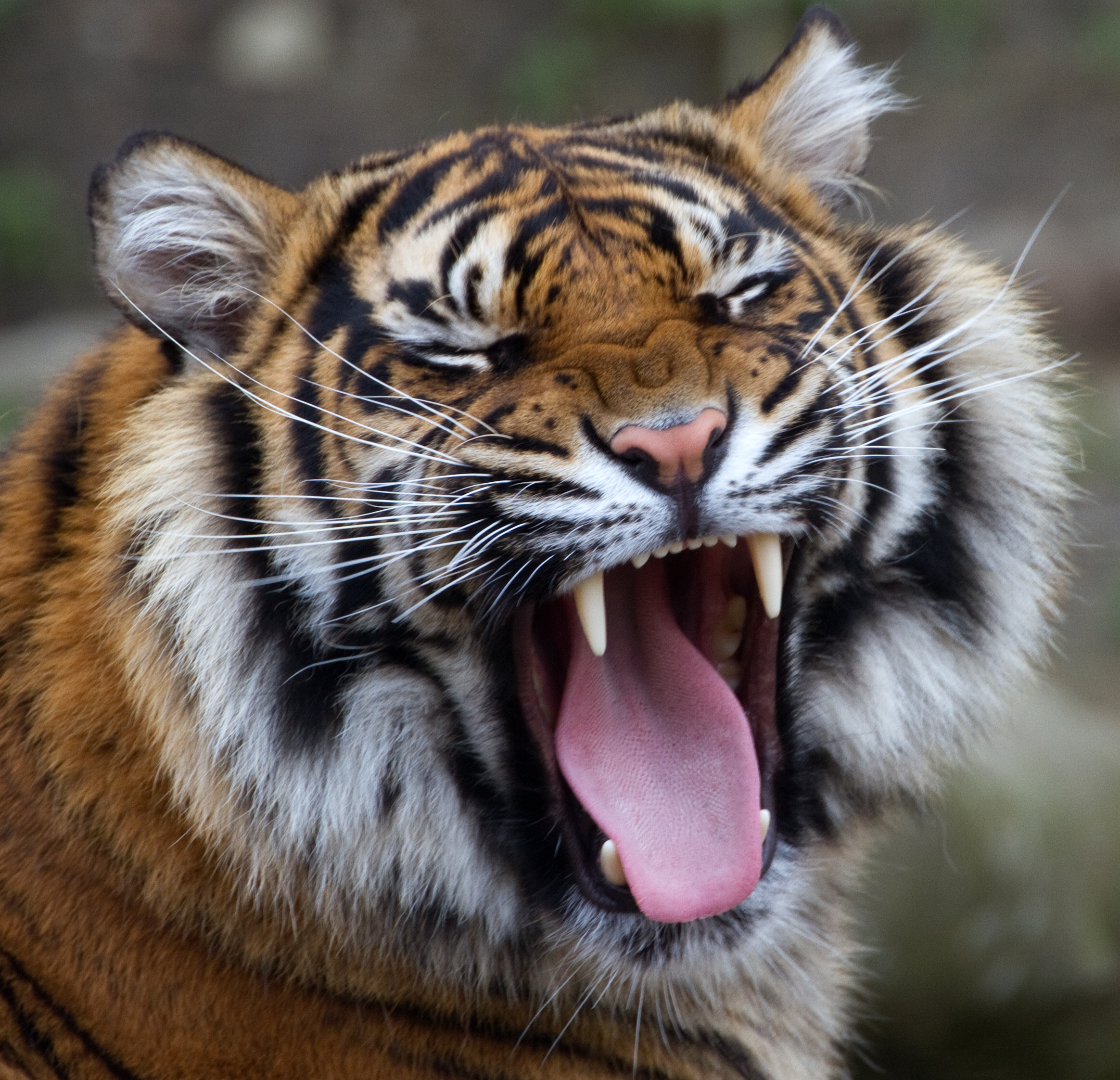 Sumatran Tiger 2